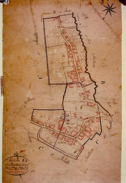 Eckendorf, plan du cadastre, XIXe siècle